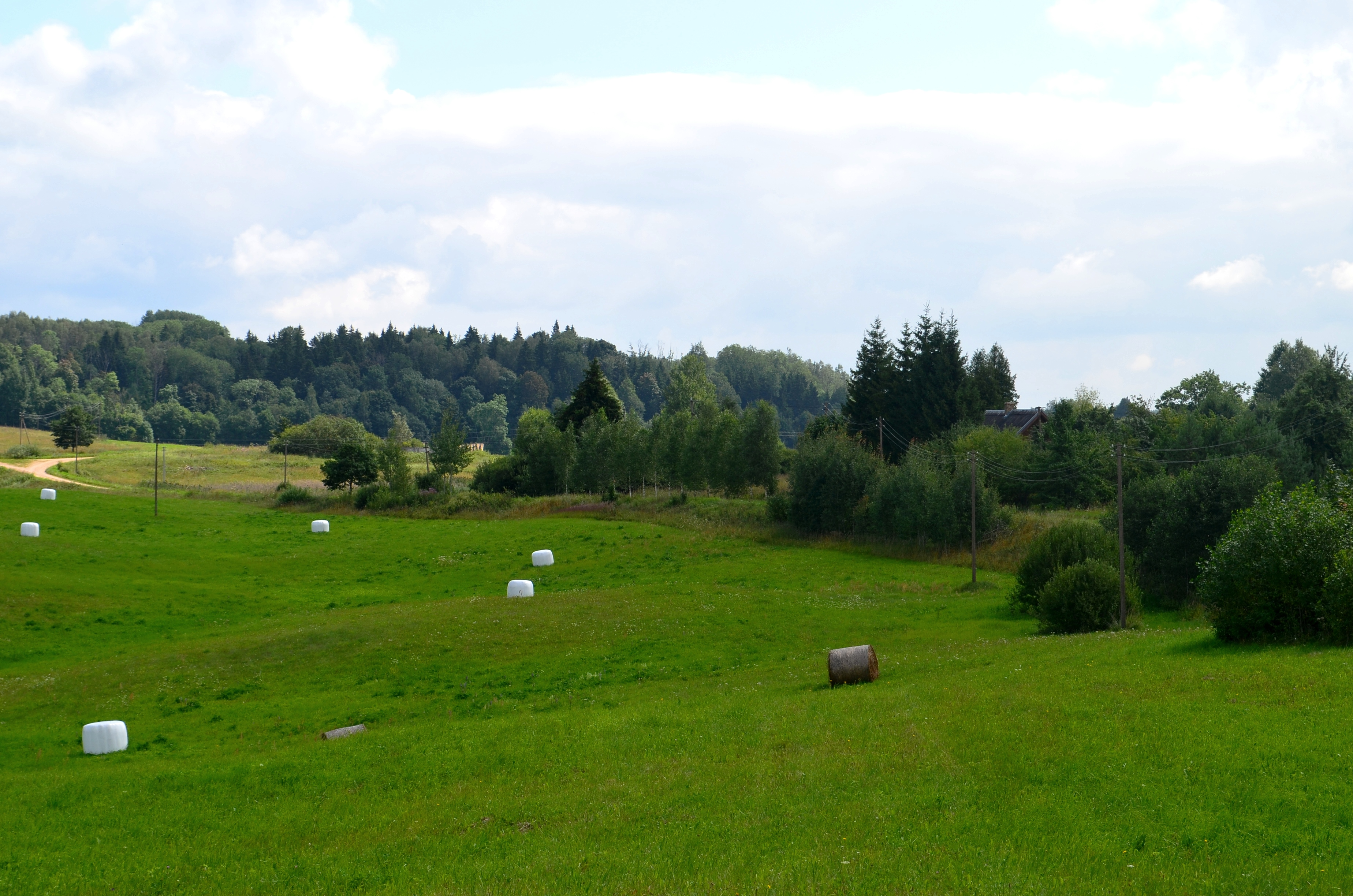 Dirniškės, Utenos raj.